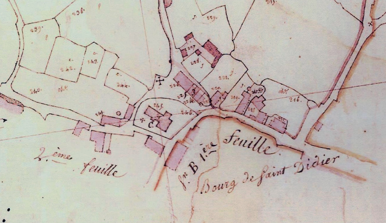 Extrait du cadastre napoléonien de Saint-Didier (Ille-et-Vilaine) ; le bourg. Les deux croix avoisinant l'église indiquent l'emplacement du cimetière. le bourg est alors composé de quelques maisons seulement (vers 1810, archives départementales d'Ille-et-Vilaine)